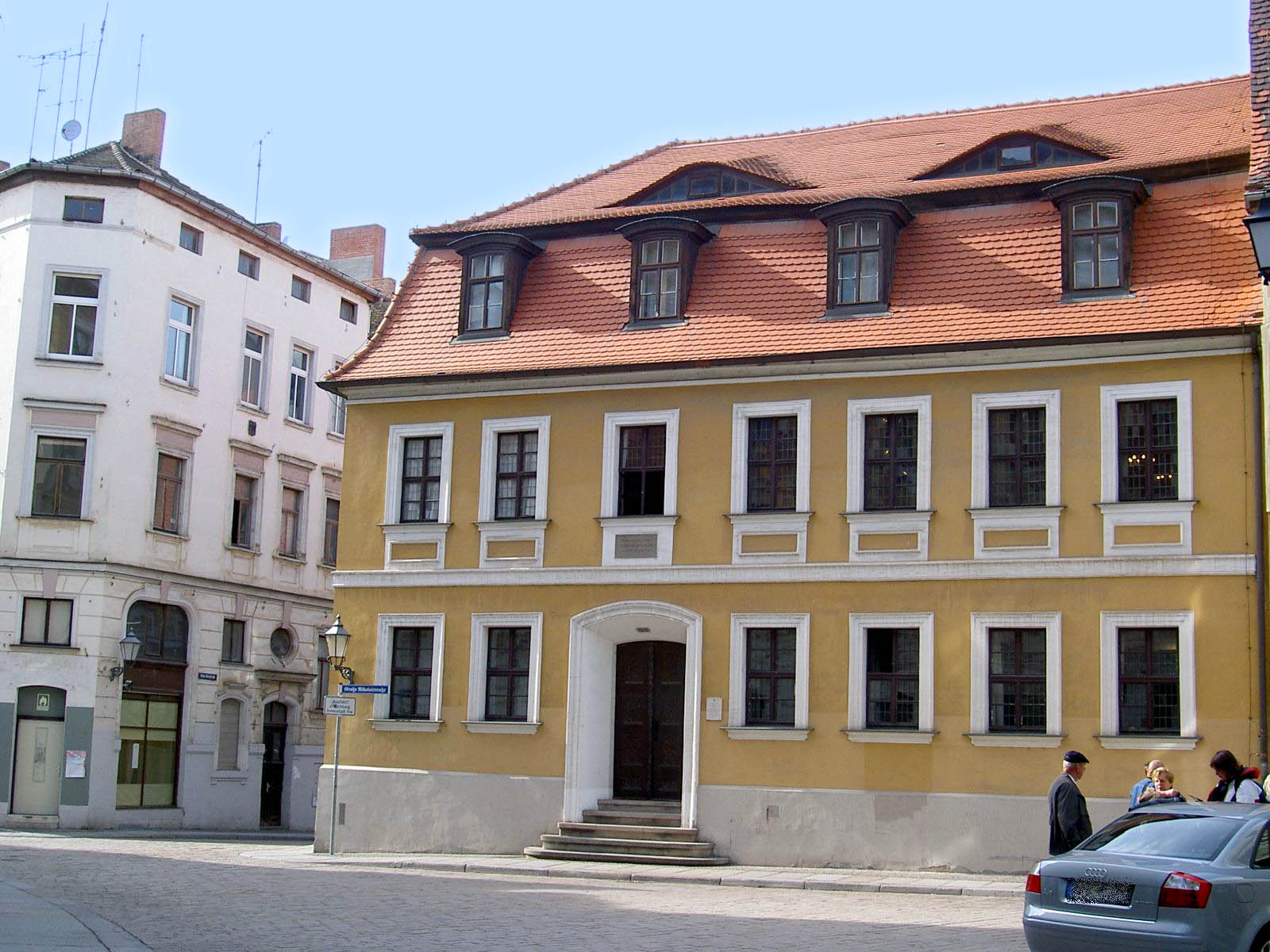 Halle an der Saale, Geburtshaus von Georg Friedrich Haendel